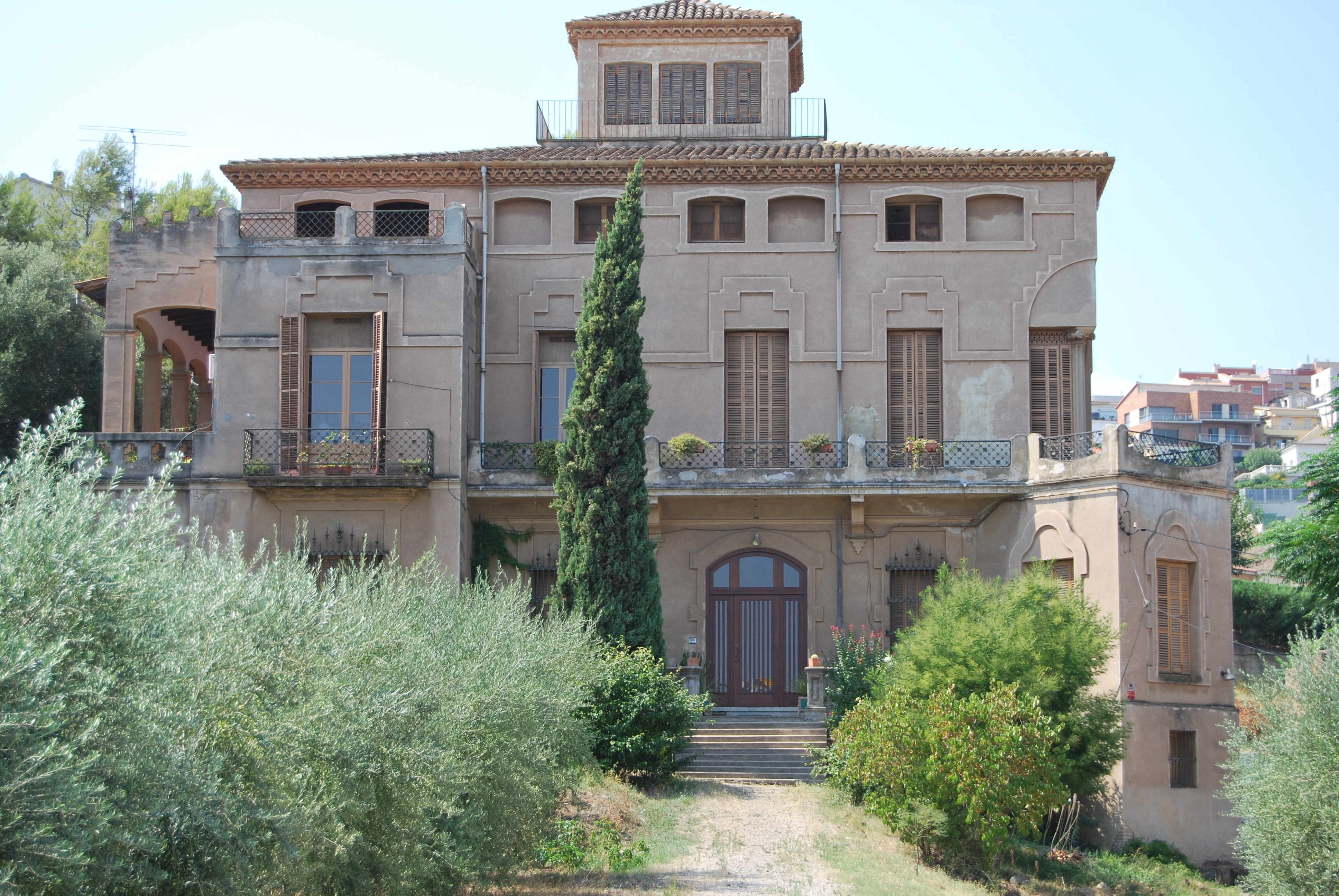 Can Reverter (Sant Vicenç dels Horts)